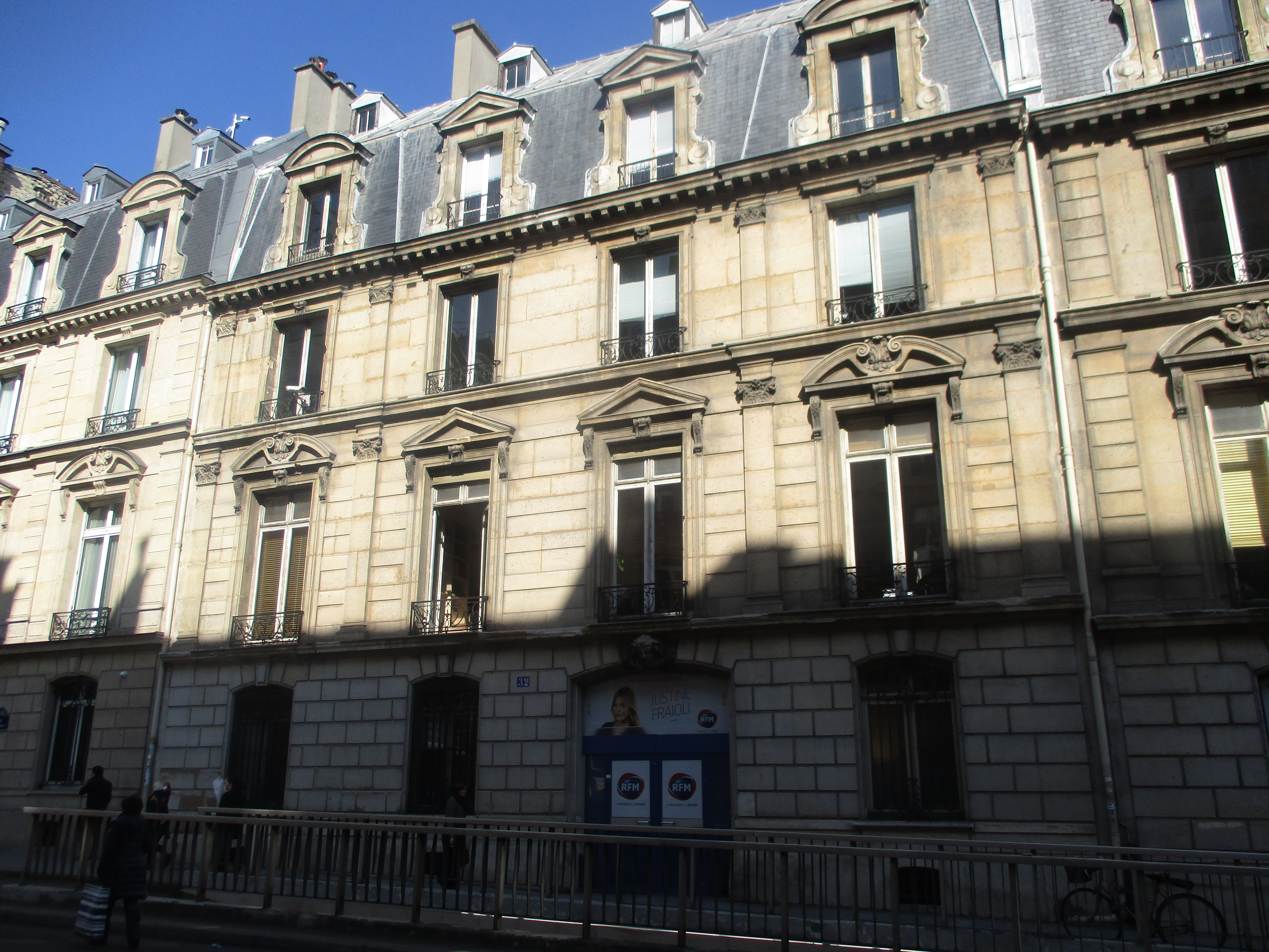 32 rue François-Ier, Paris VIIIe; ancien hôtel particulier de Pange, puis immeuble d'Europe I.